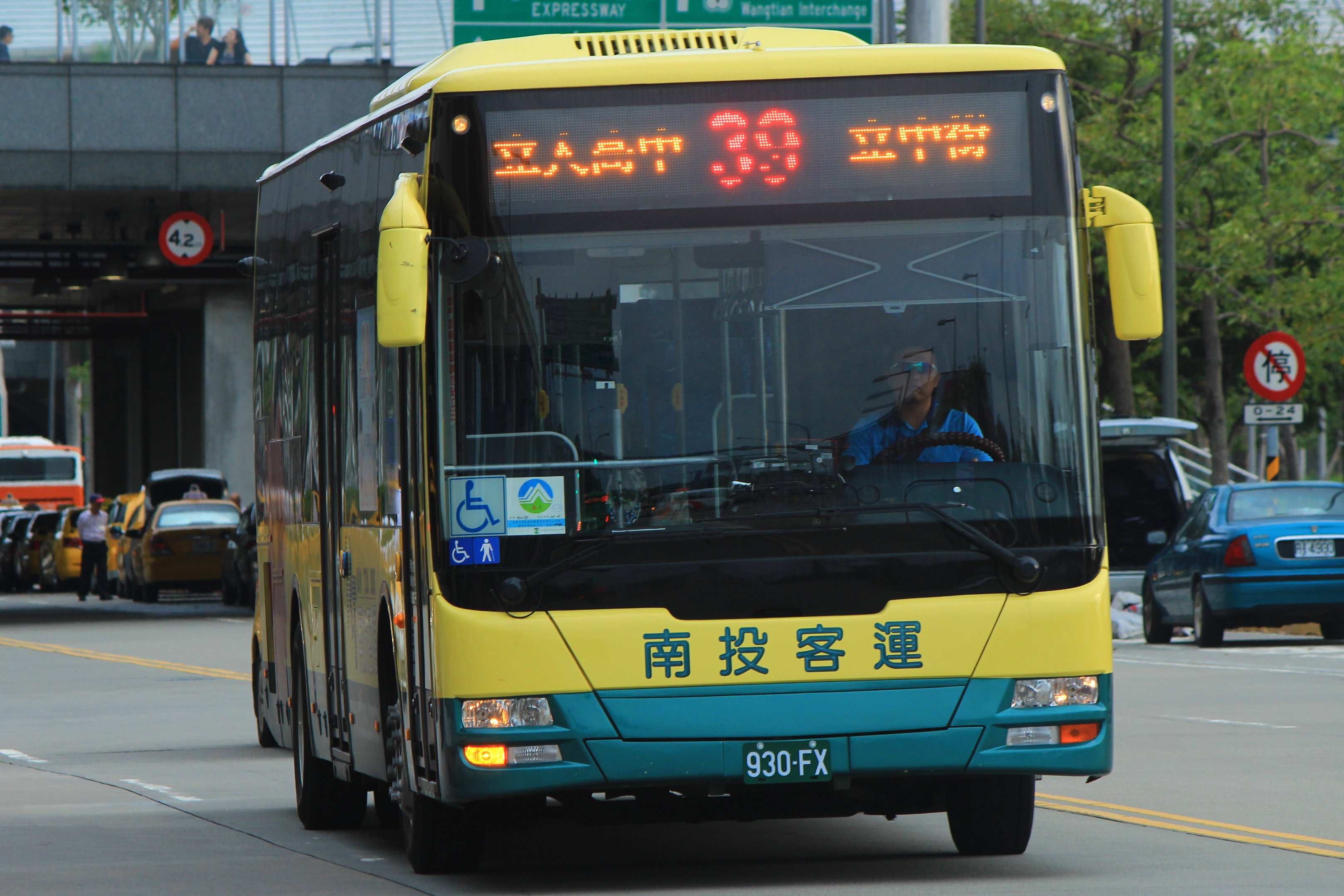 中文（台灣）: 出高鐵台中站